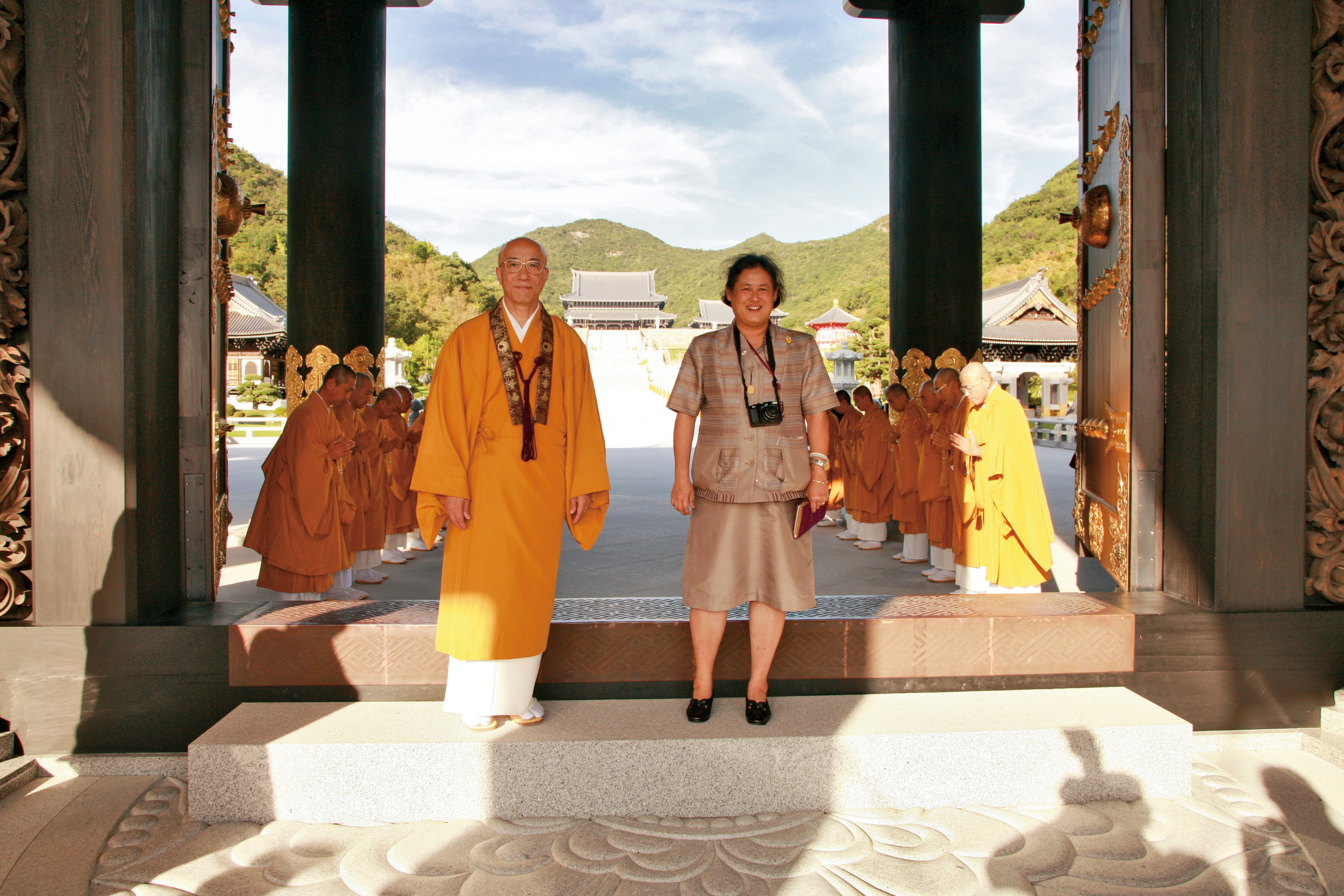 「佛教之王堂」念佛宗三寶山無量壽寺（念仏宗三宝山無量寿寺）総本山の山門 シリントーン王女参詣